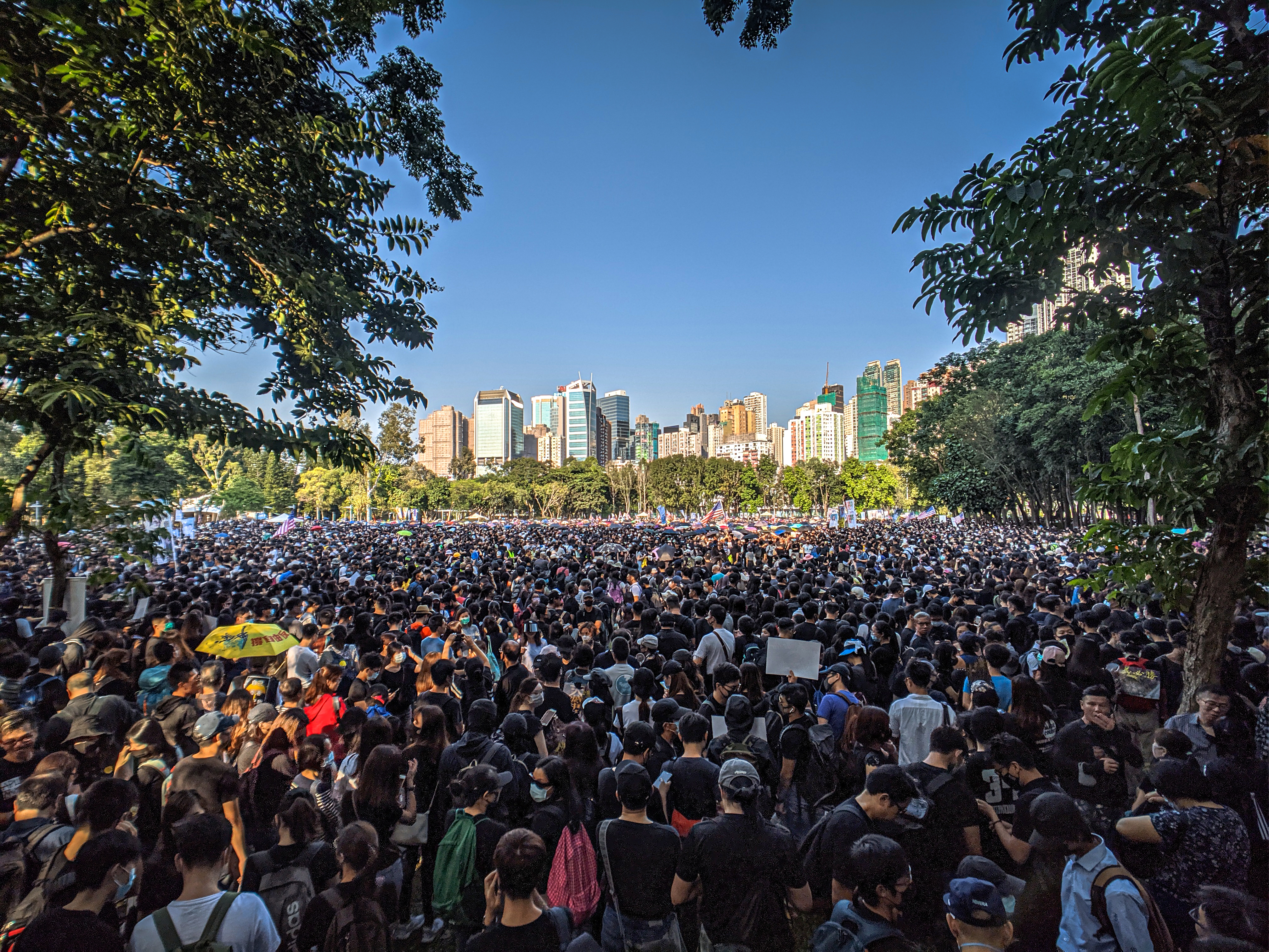 IMG_20191102_153218